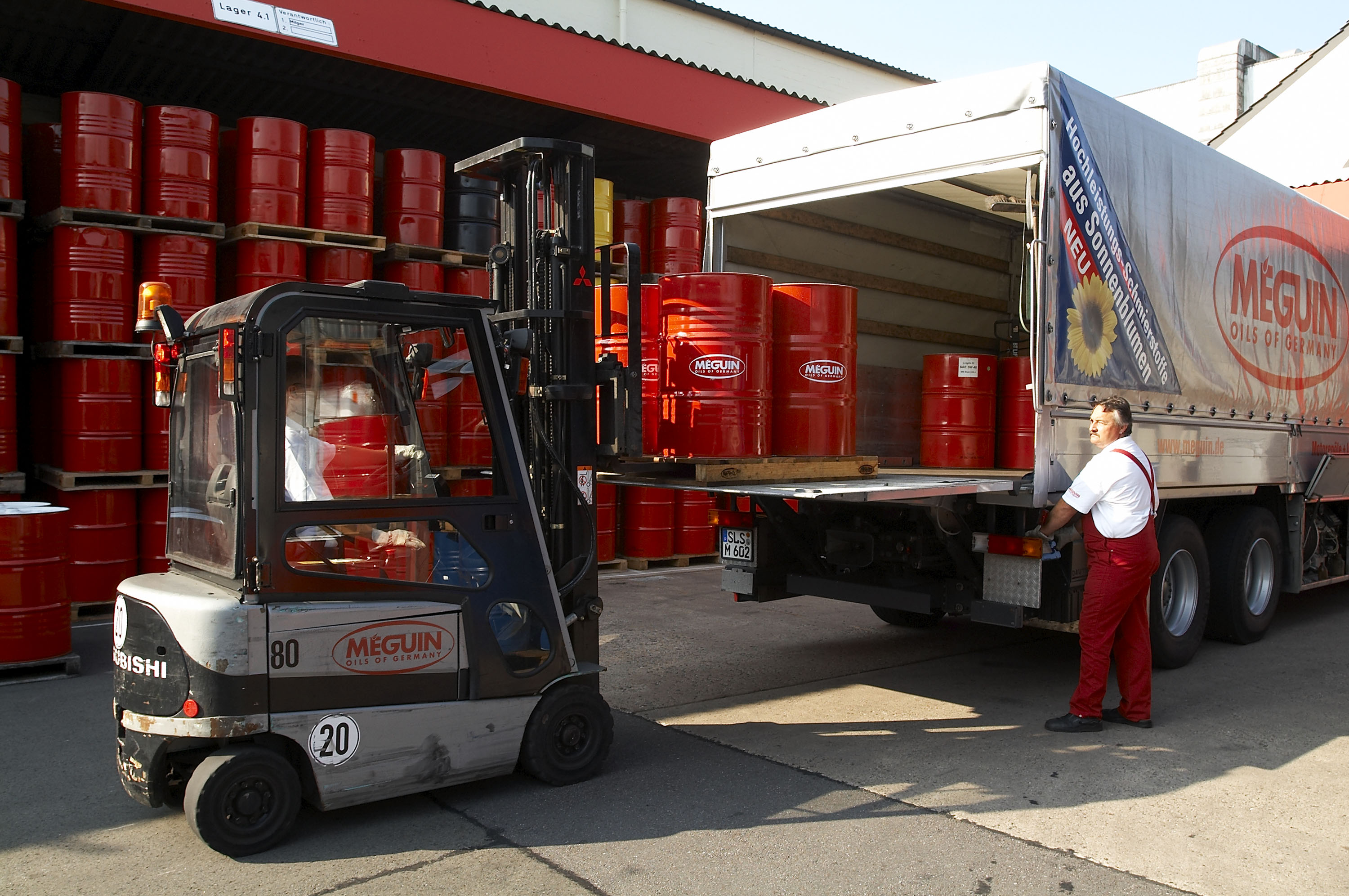 Verladung von Ölfässern bei Méguin